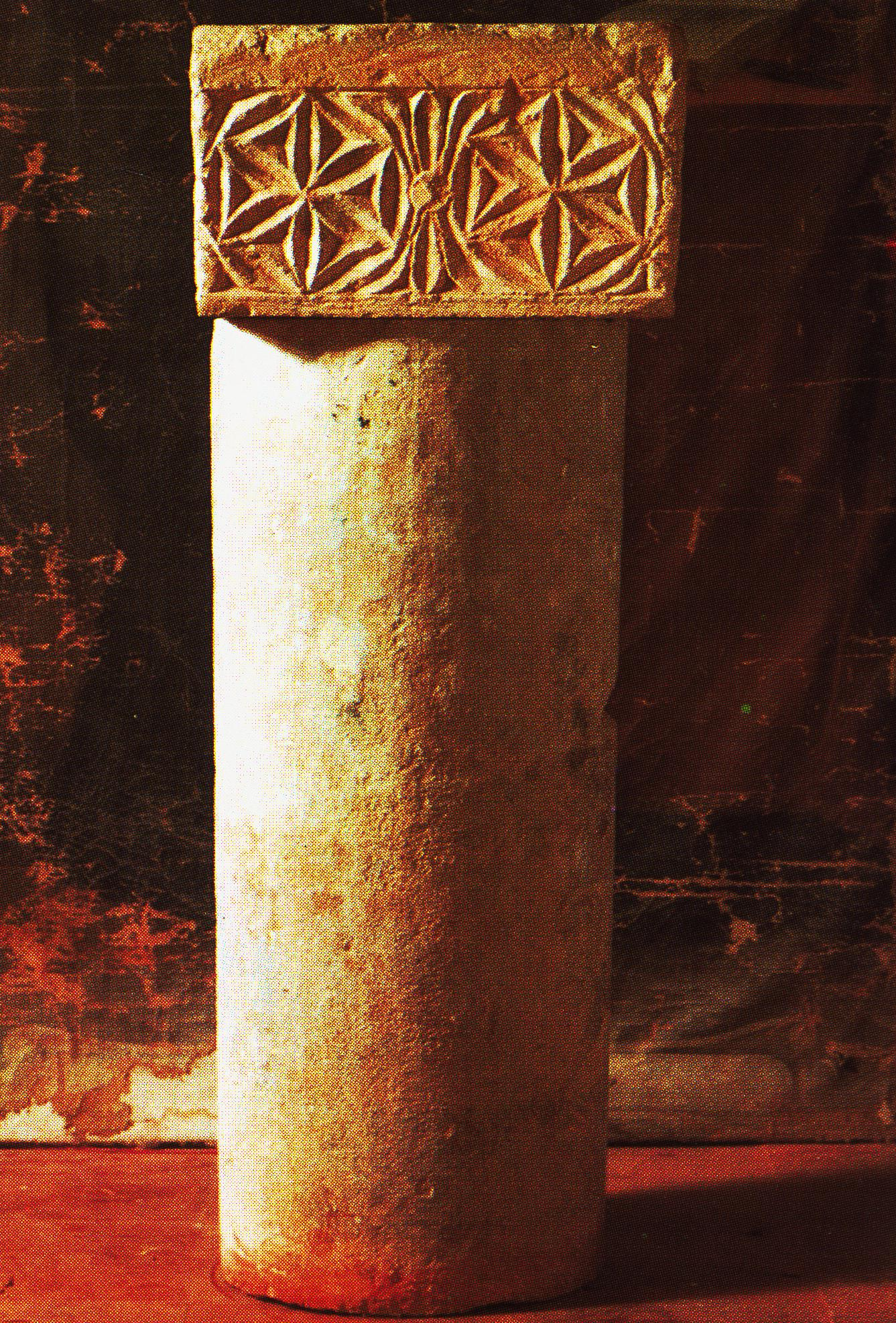 pilar de agua bendita de la Ermita de Santa Cecilia. Barriosuso(Burgos)